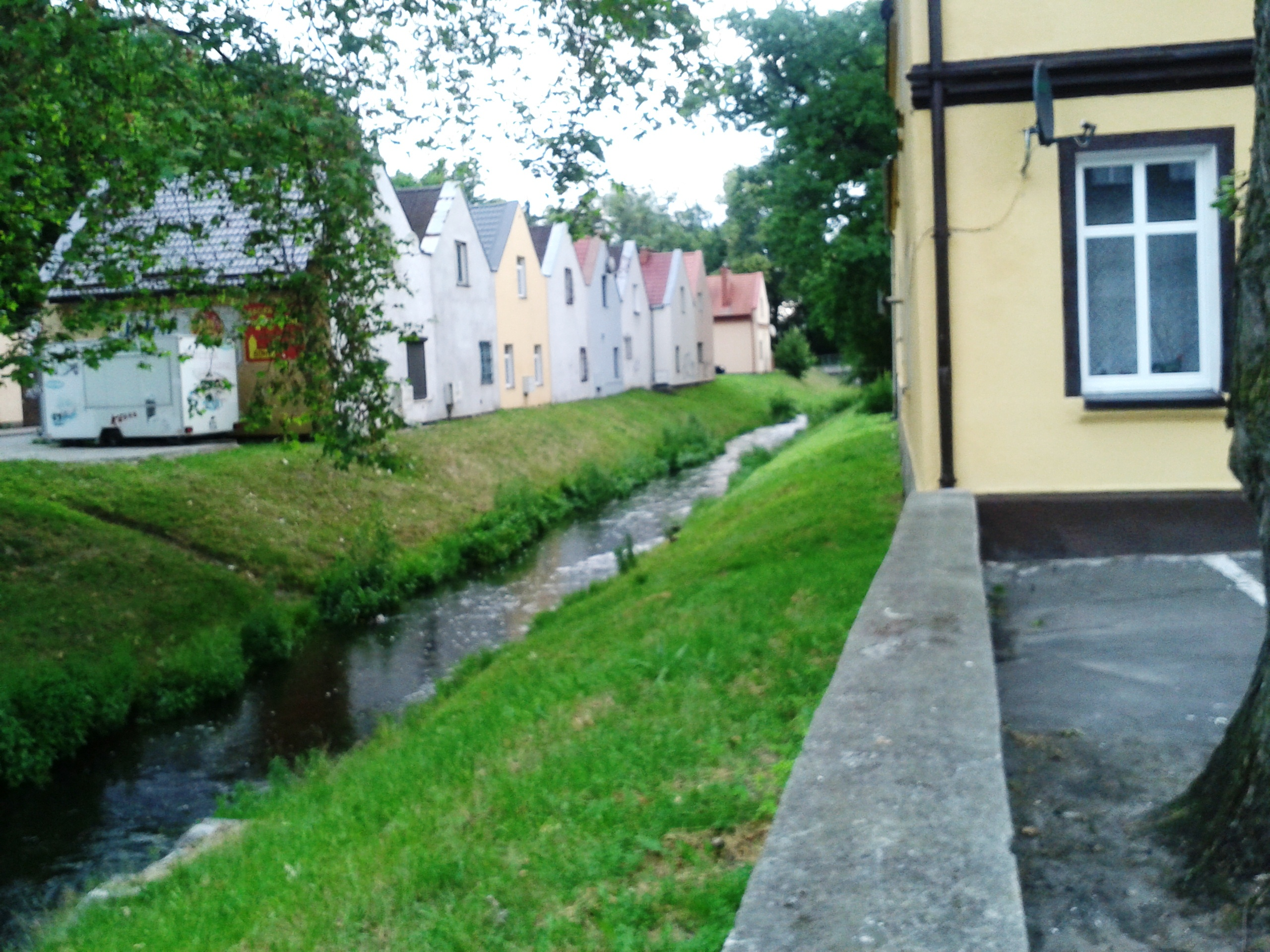 Drawa w Drawsku Pomorskim - odnoga lewa (mniejsza)